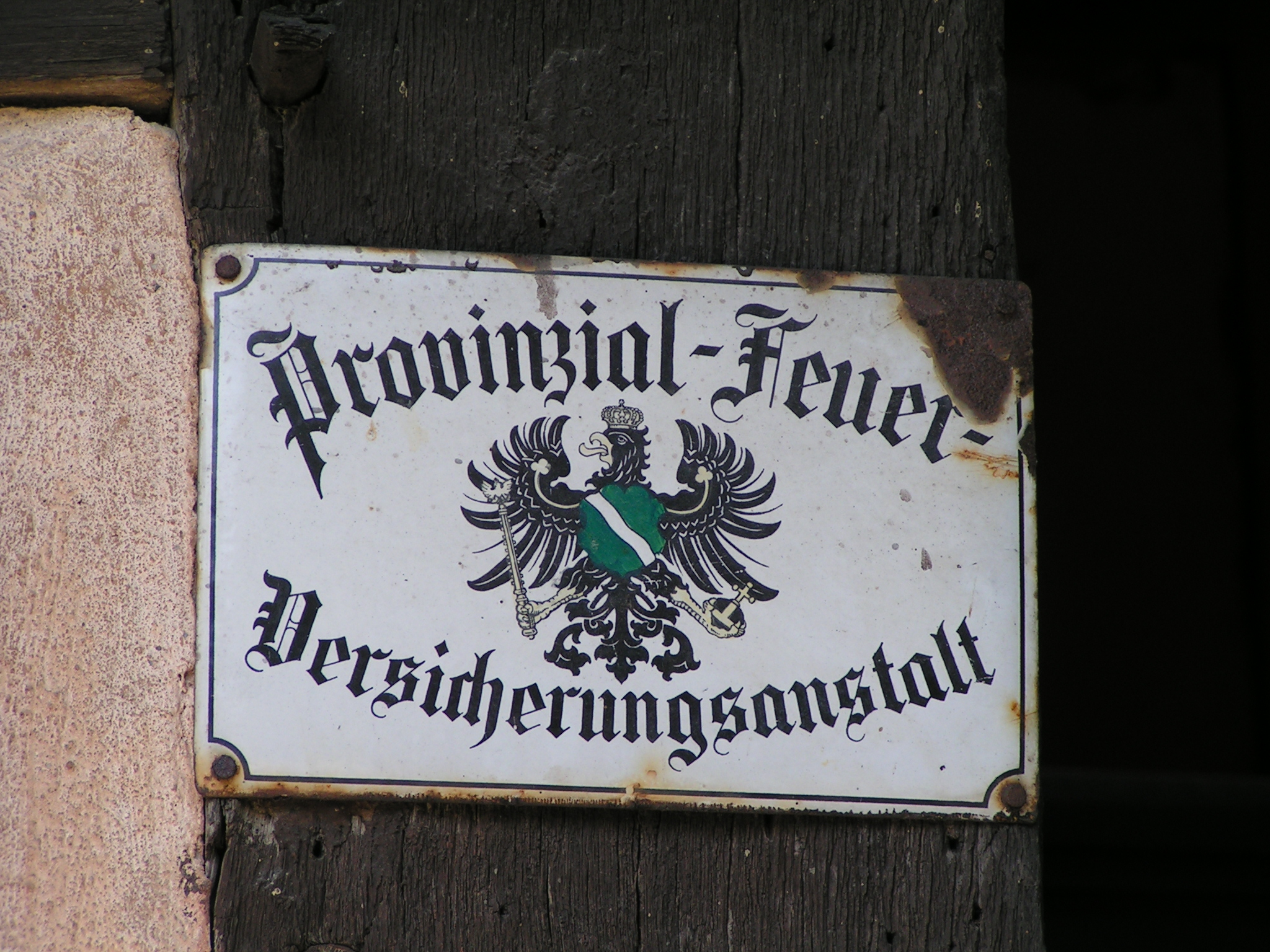 Feuerversicherungs-Schild auf dem Roscheider Hof bei Konz (1. August 2004)